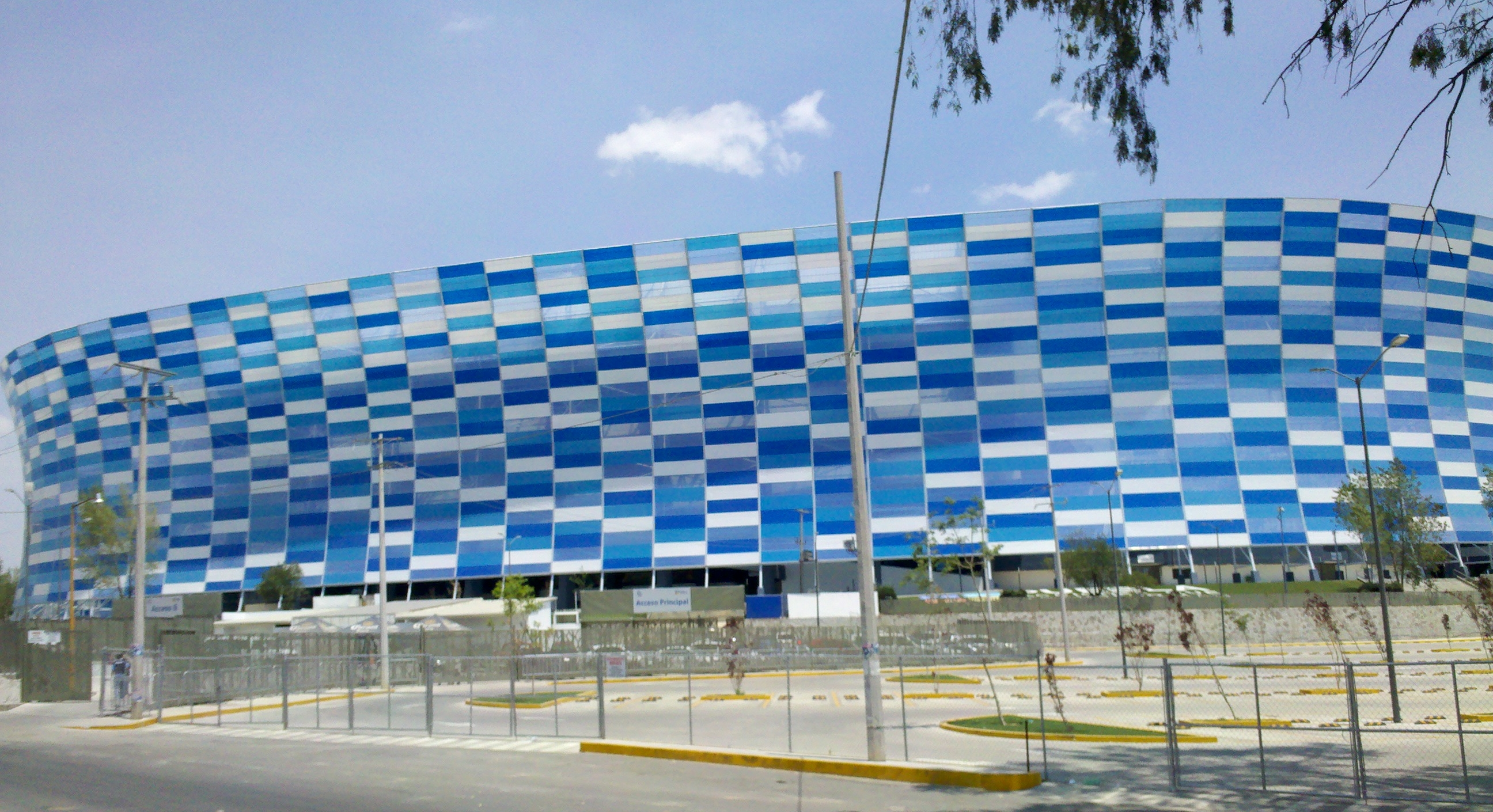 Exterior del Estadio Cuauhtémoc luego de su remodelación de 2015 (pero foto de 2016). Puebla, México.